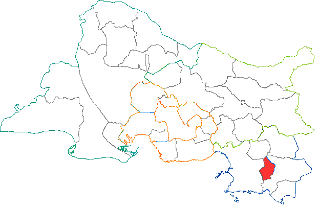 Situation du canton dans le département des Bouches-du-Rhône (France)